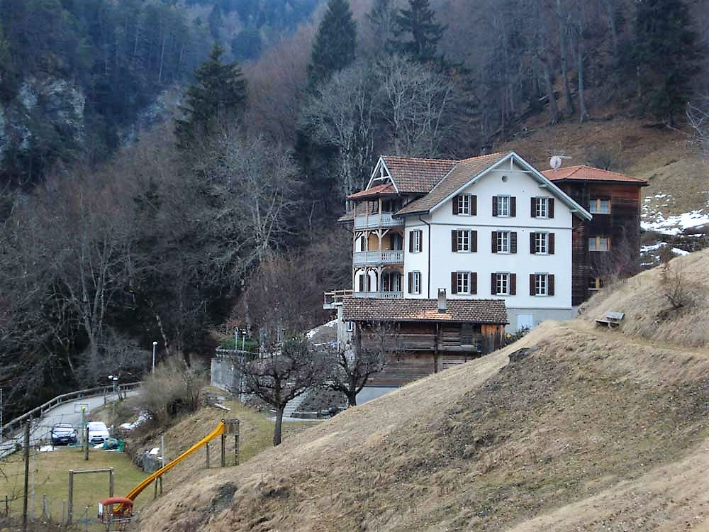 Fontana Bildungsstätte Passugg, neues Gebäude